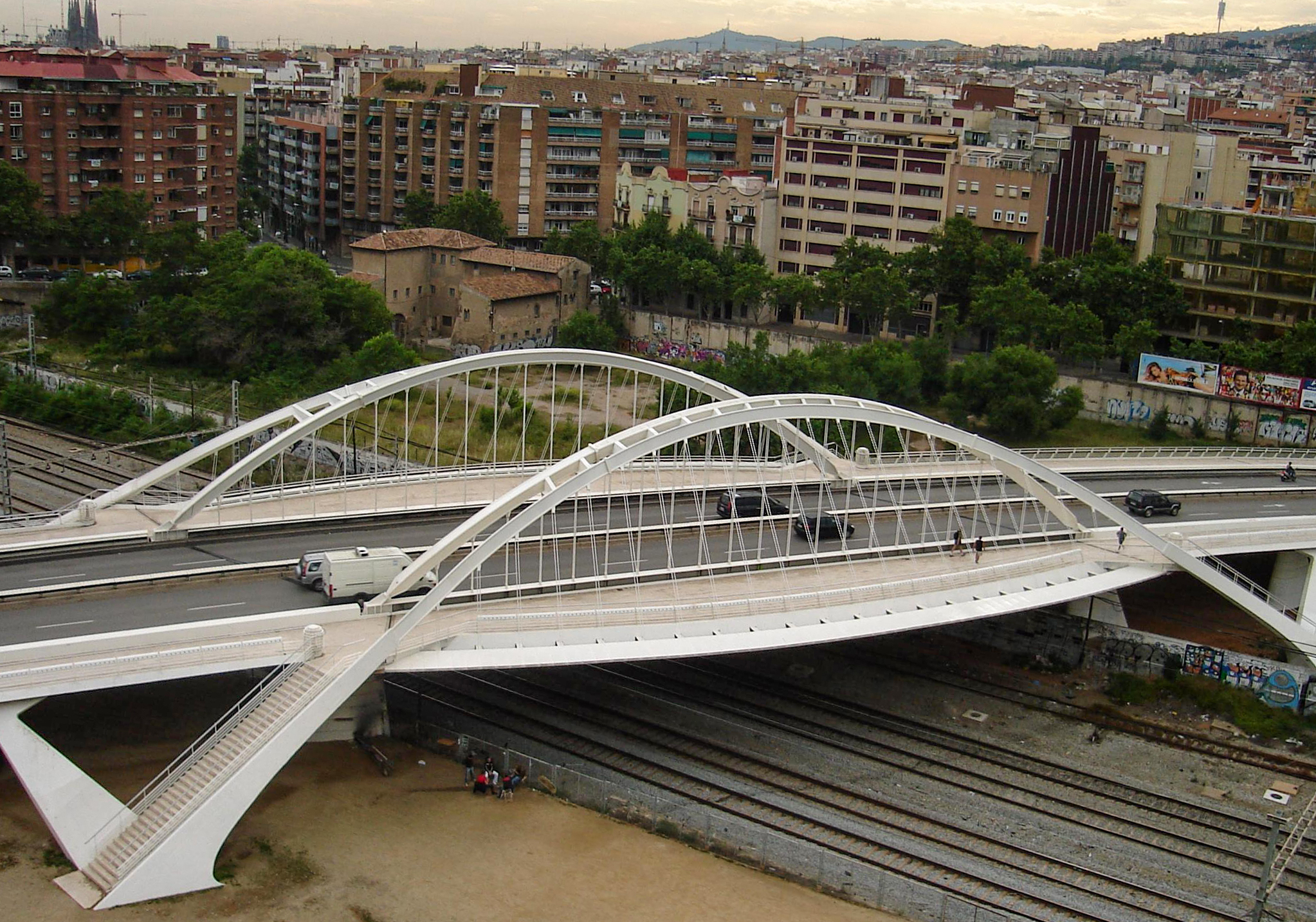 Puente de Calatrava- Bach de Roda